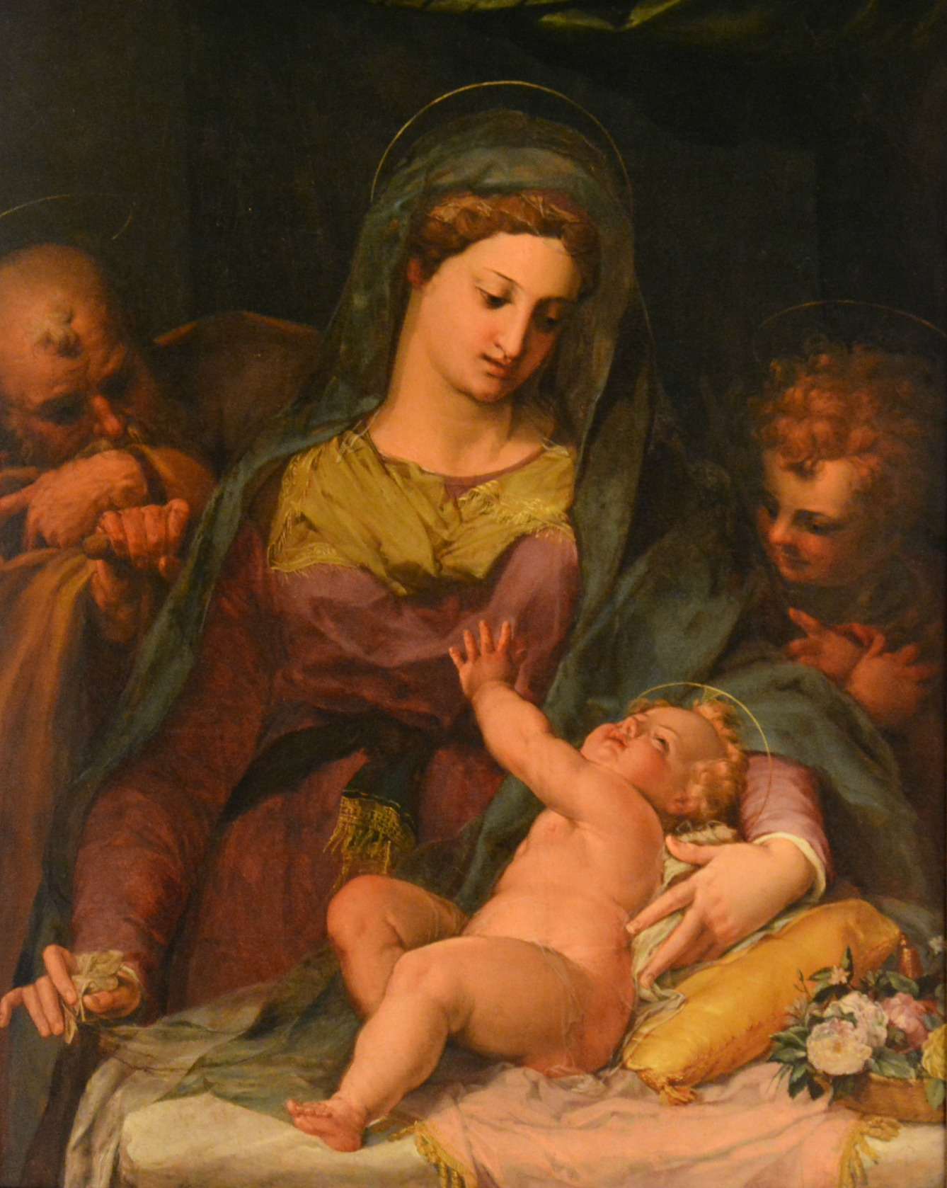 Vedi titolo